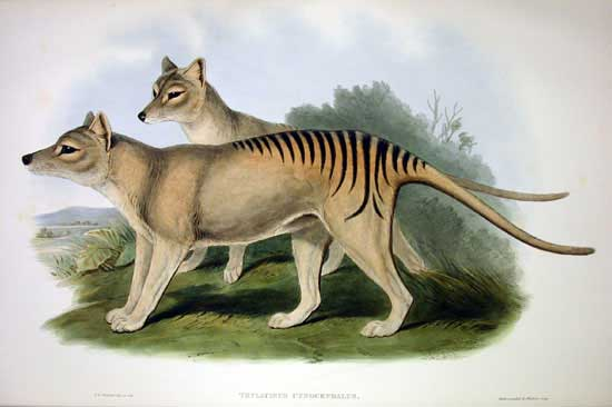 Thylacinus cynocephalus